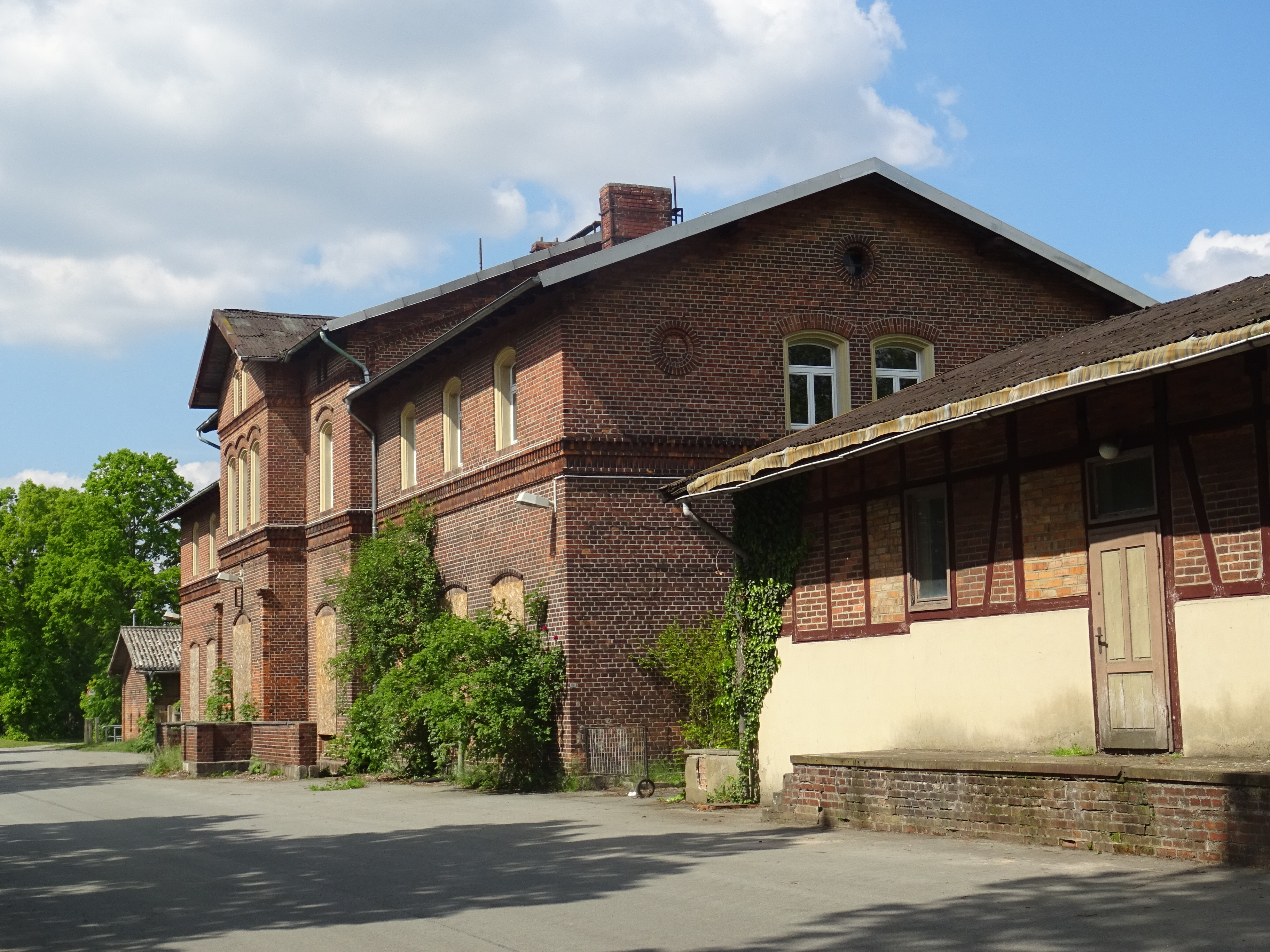 Bahnhof Hohenwulsch, denkmalgeschütztes Empfangsgebäude,, Straßenseite